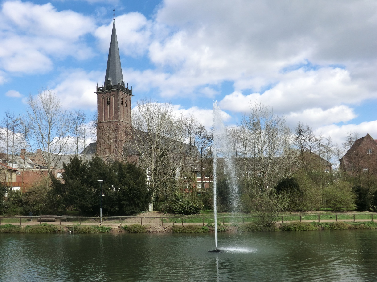 St. Nicolai (Kalkar), Kalkar, North Rhine-Westphalia, Germany